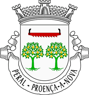 Brazão da freguesia de Peral